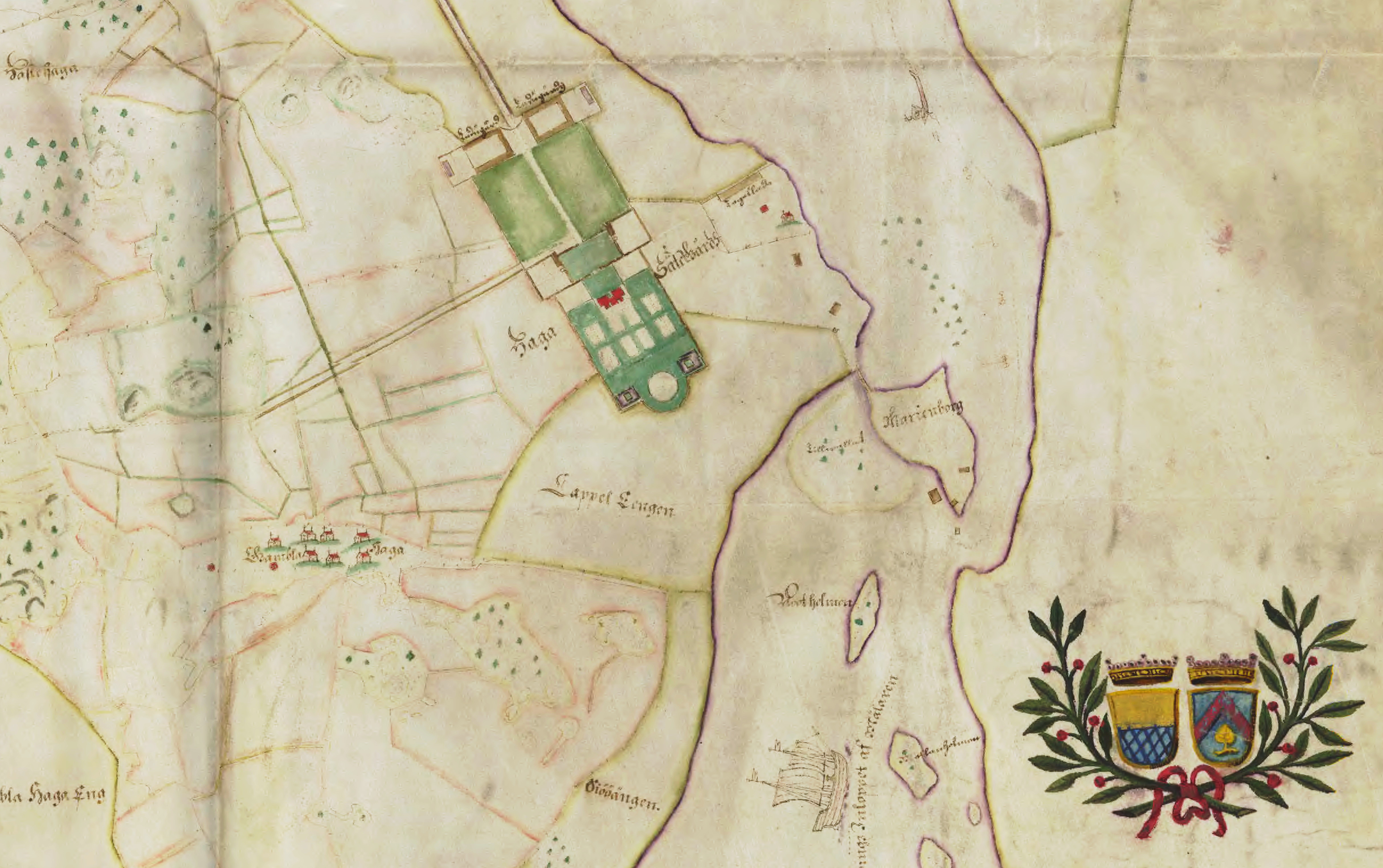 Haga slotts huvudbebyggelse med Gustaf Persson Natt och Dags och hans hustrus, Kristina Ulfsparres, vapen.